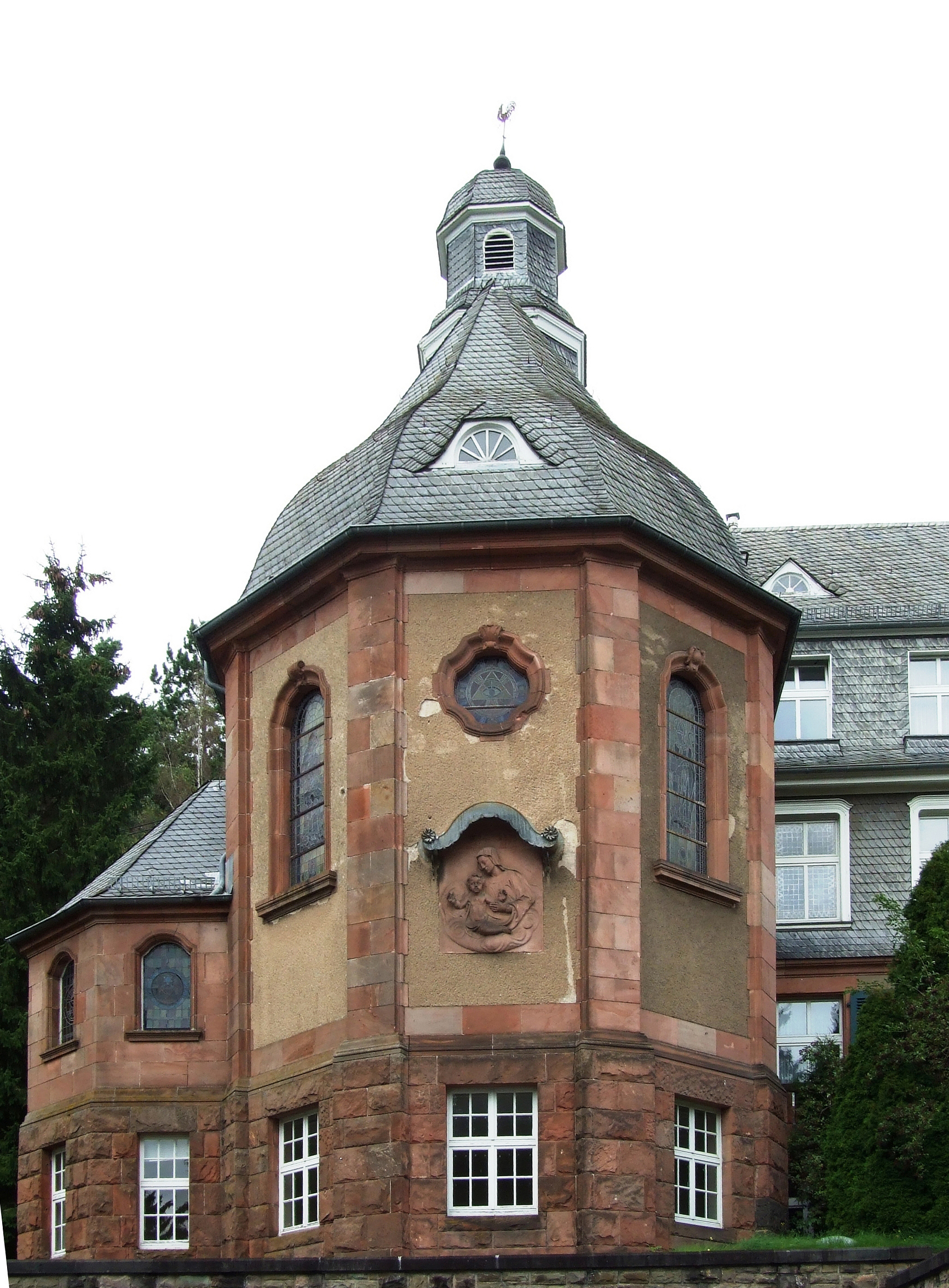 Nettersheim, Herz-Jesu-Kloster, Kapelle (Straßenseite)